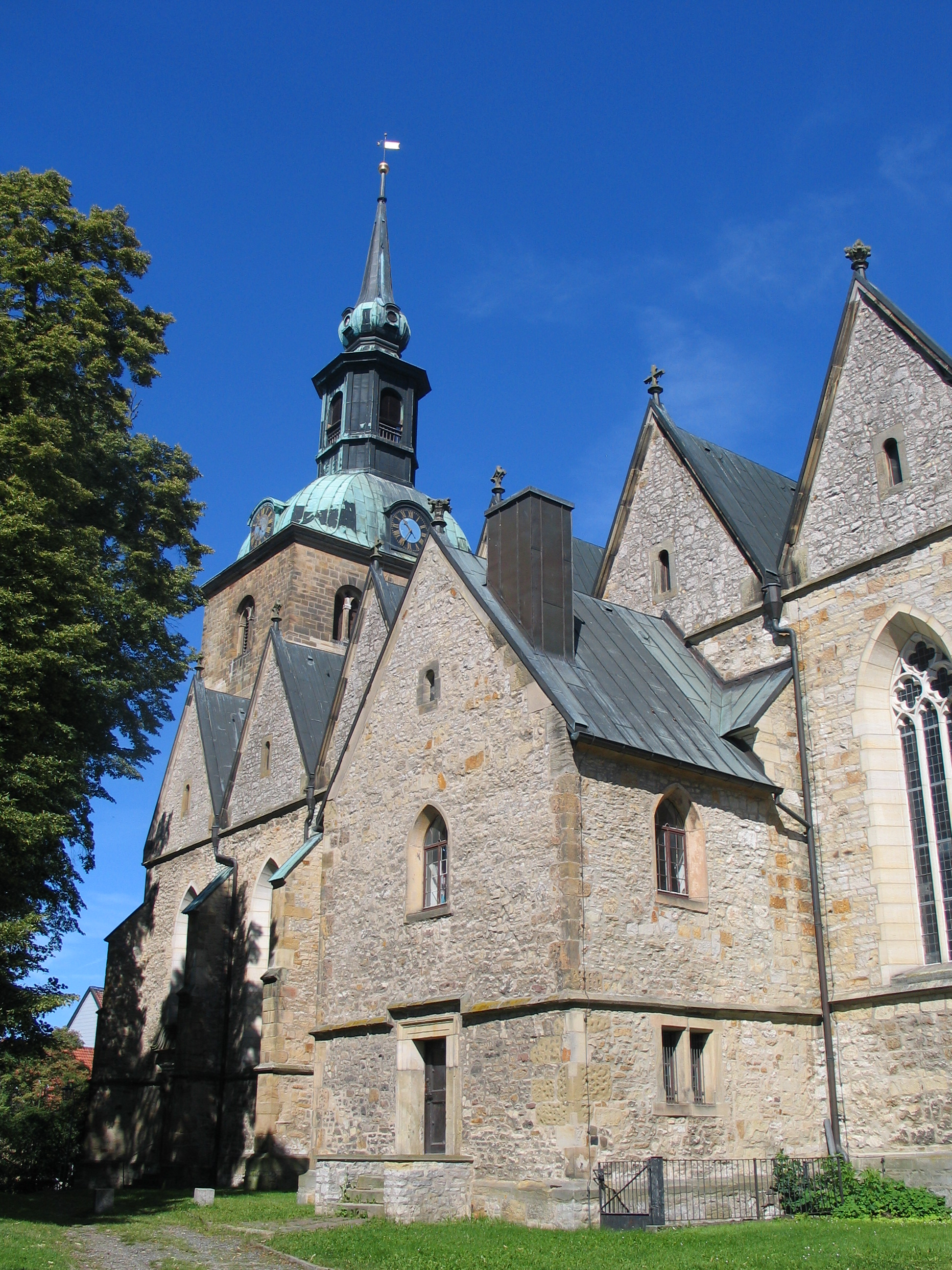 St. Pankratiuskirche